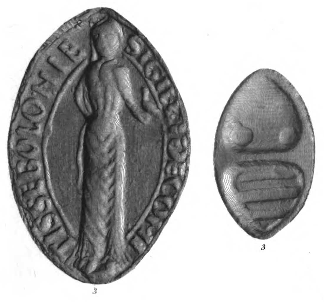 Pečeť Idy z Boulogne